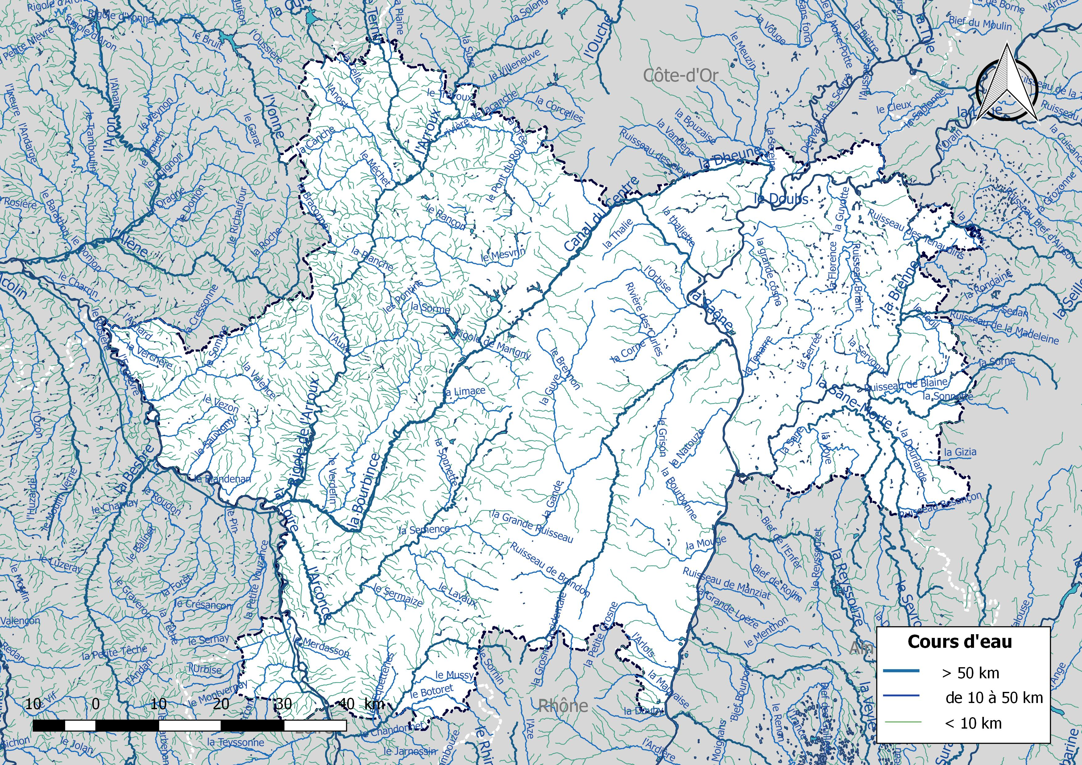 Réseau hydrographique du département de la Saône-et-Loire (France).